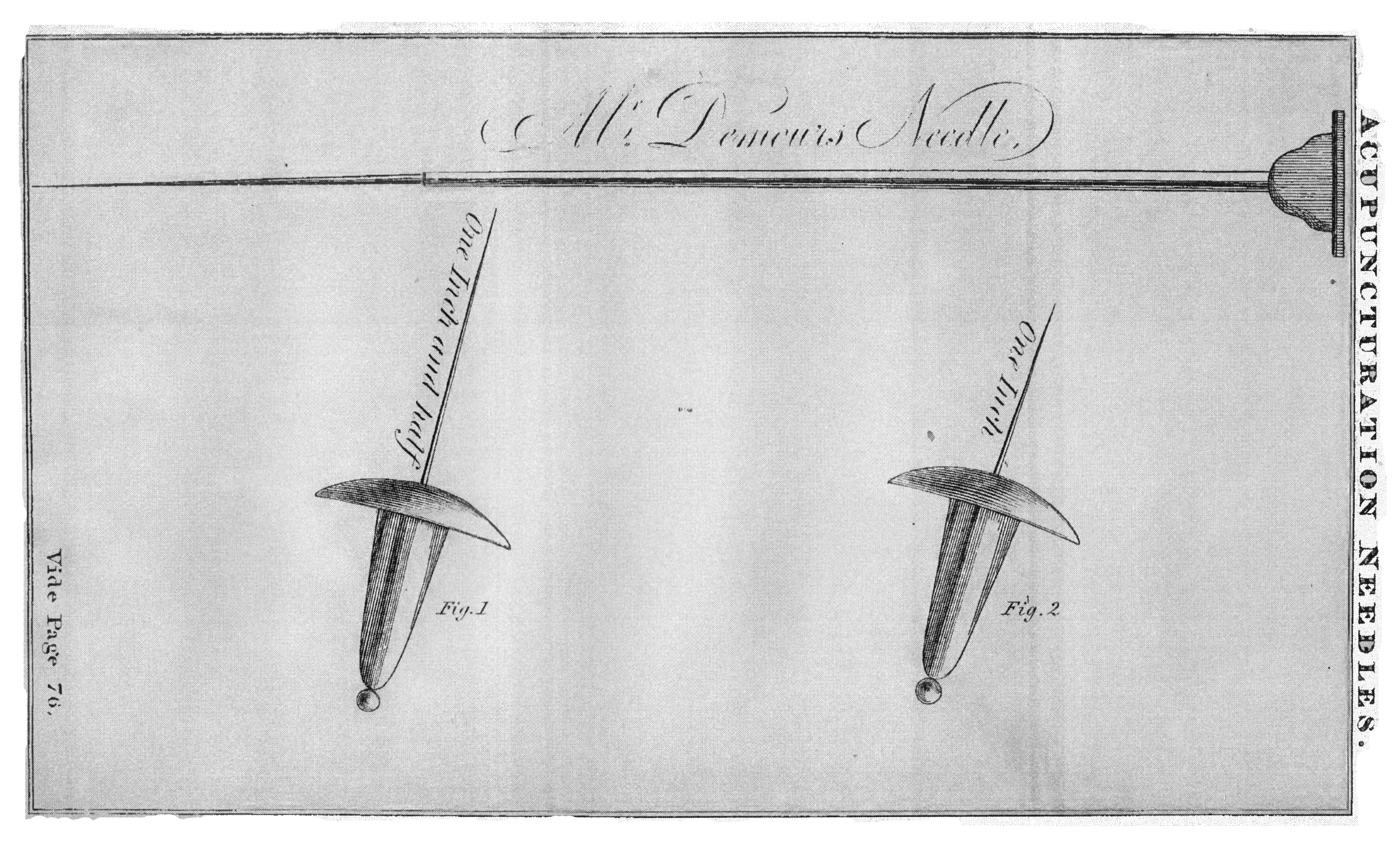 Akupunkturnadeln